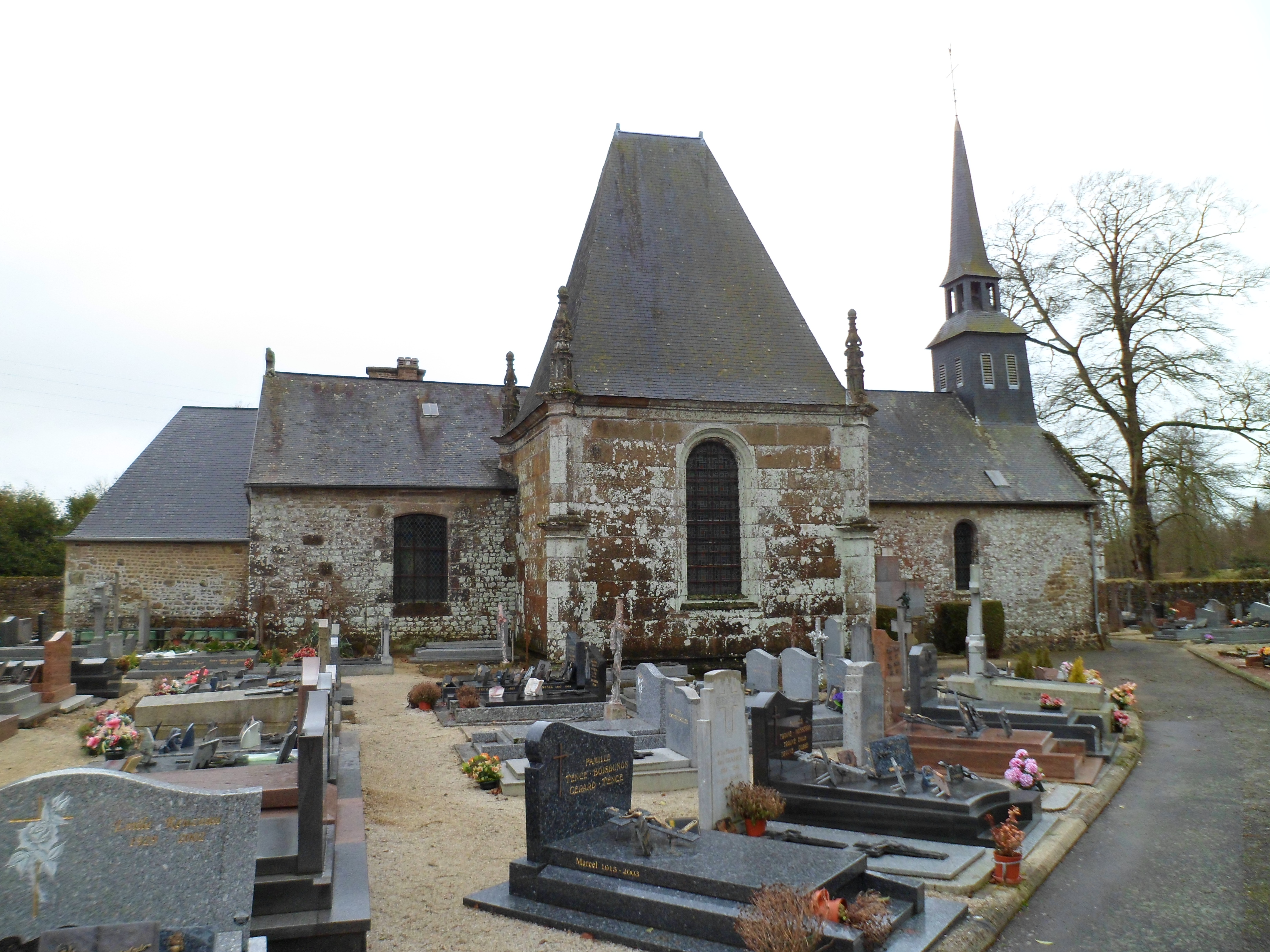 Église Saint-Symphorien de Saint-Symphorien-des-Monts